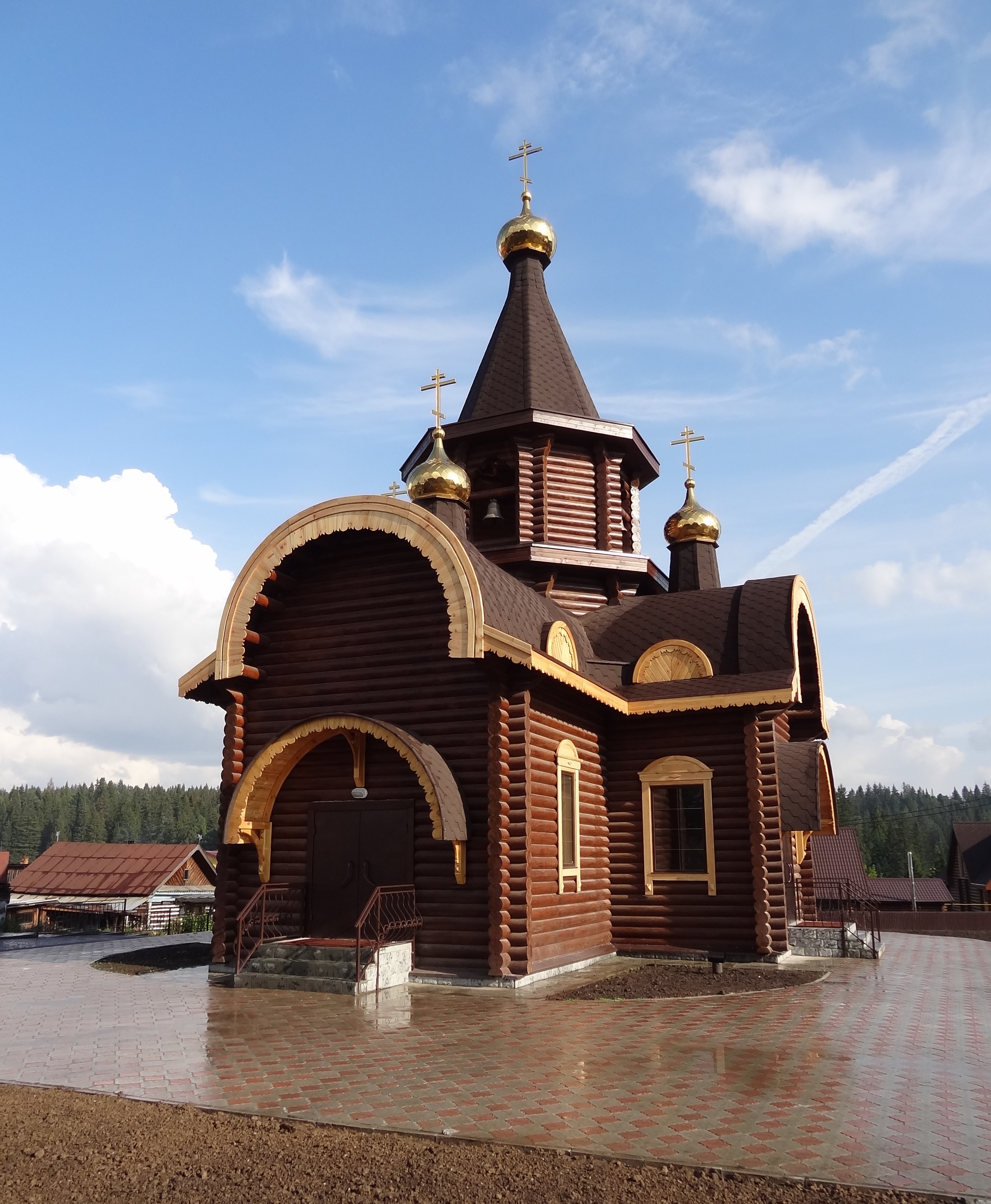 Церковь рождества Ивана Крестителя в Заварзино